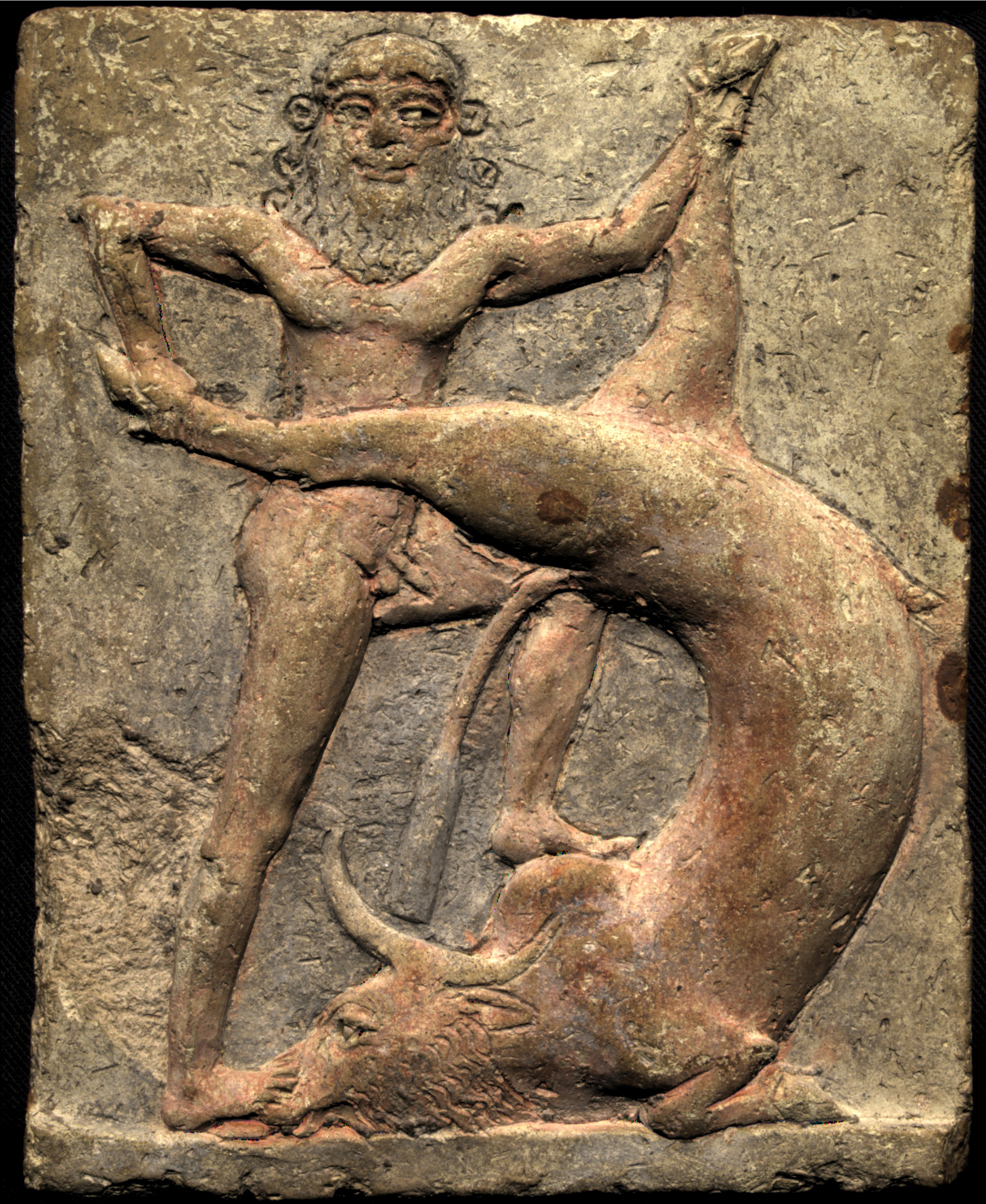 Representation of Gilgamesh, the king-hero from the city of Uruk, battling the 'bull of heavens'; terracotta relief kept at the Royal Museums of Art and History, Brussels